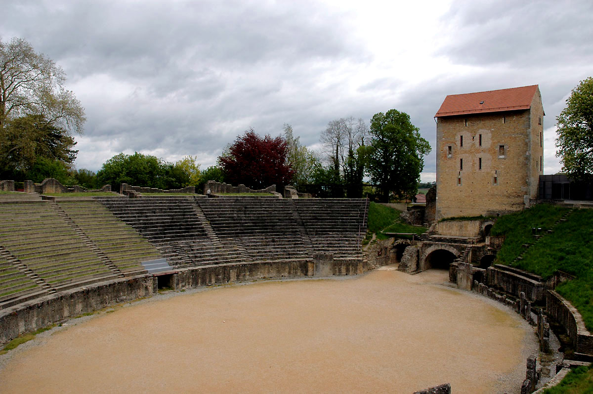 Aventicum/Avenches, Schweiz